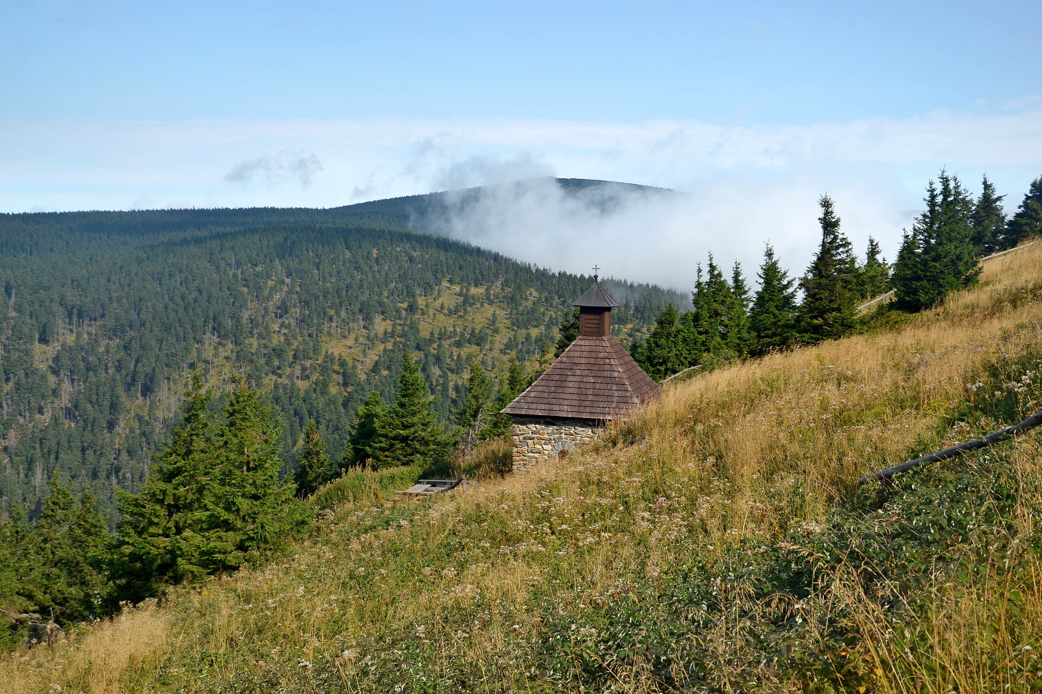 Vřesová studánka (Heidebrünnel), Hrubý Jeseník